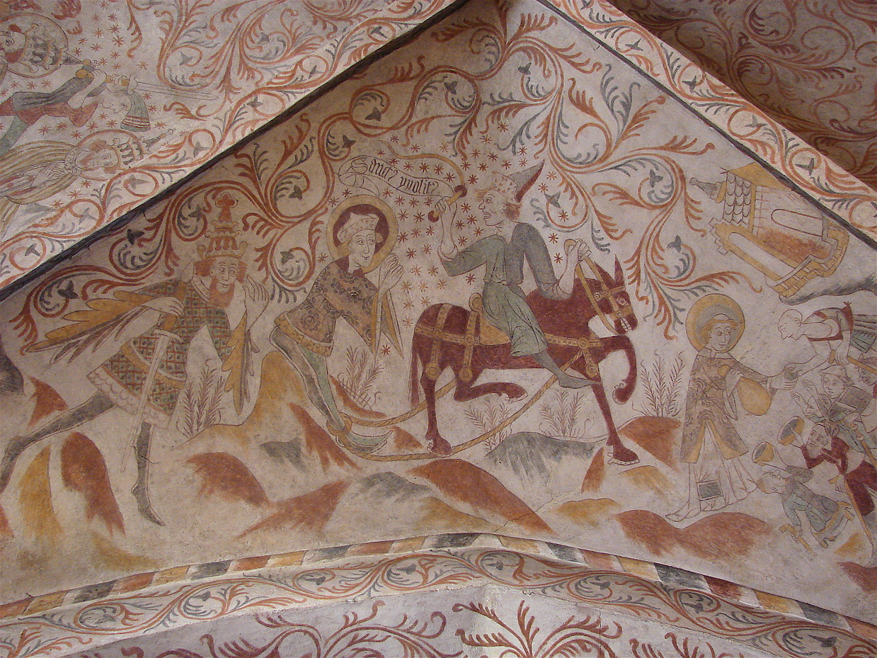 Hippolyt, kalkmaleri i Over Dråby Kirke på Sjælland, Danmark.